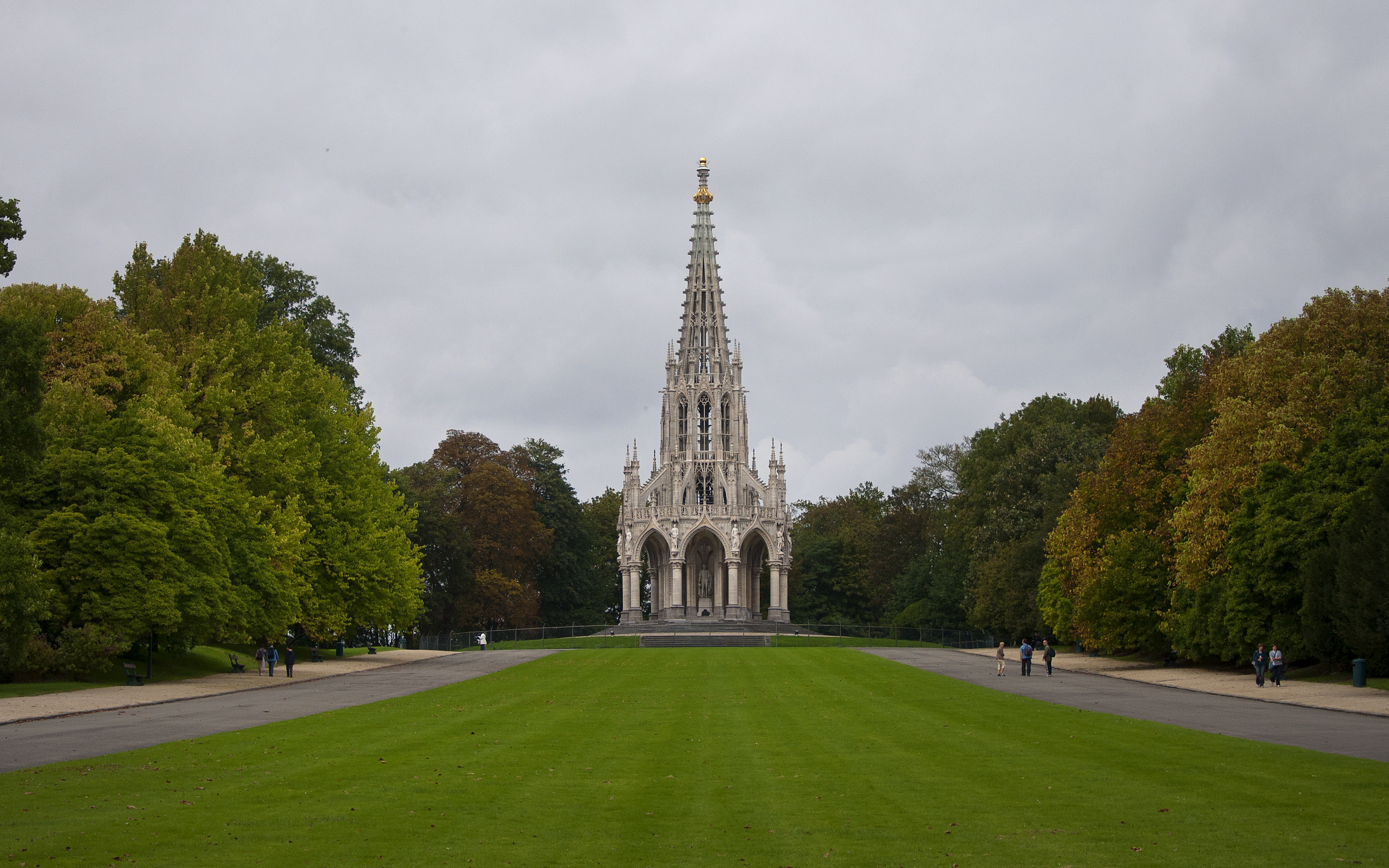 Het Leopold I-monument in het park van Laken, België